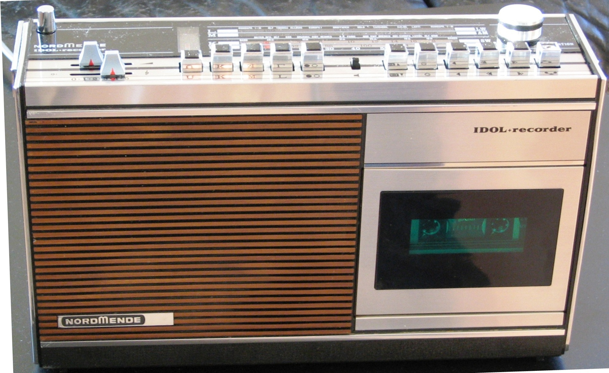 Der tragbare Radiorekorder Nordmende IDOL+recorder 115A wurde in den Jahren 1973 bis 1975 hergestellt. Nähere technische Informationen über dieses Modell sind unter Nordmende IDOL + recorder 115A nachlesbar.